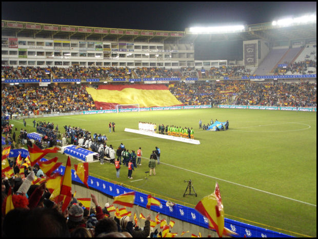 Imagen del Jose Zorrilla tomada con camara propia desde la pref. A del Estadio el pasado mes de Marzo de 2006. Partido España-Costa de Marfil. (3-2)